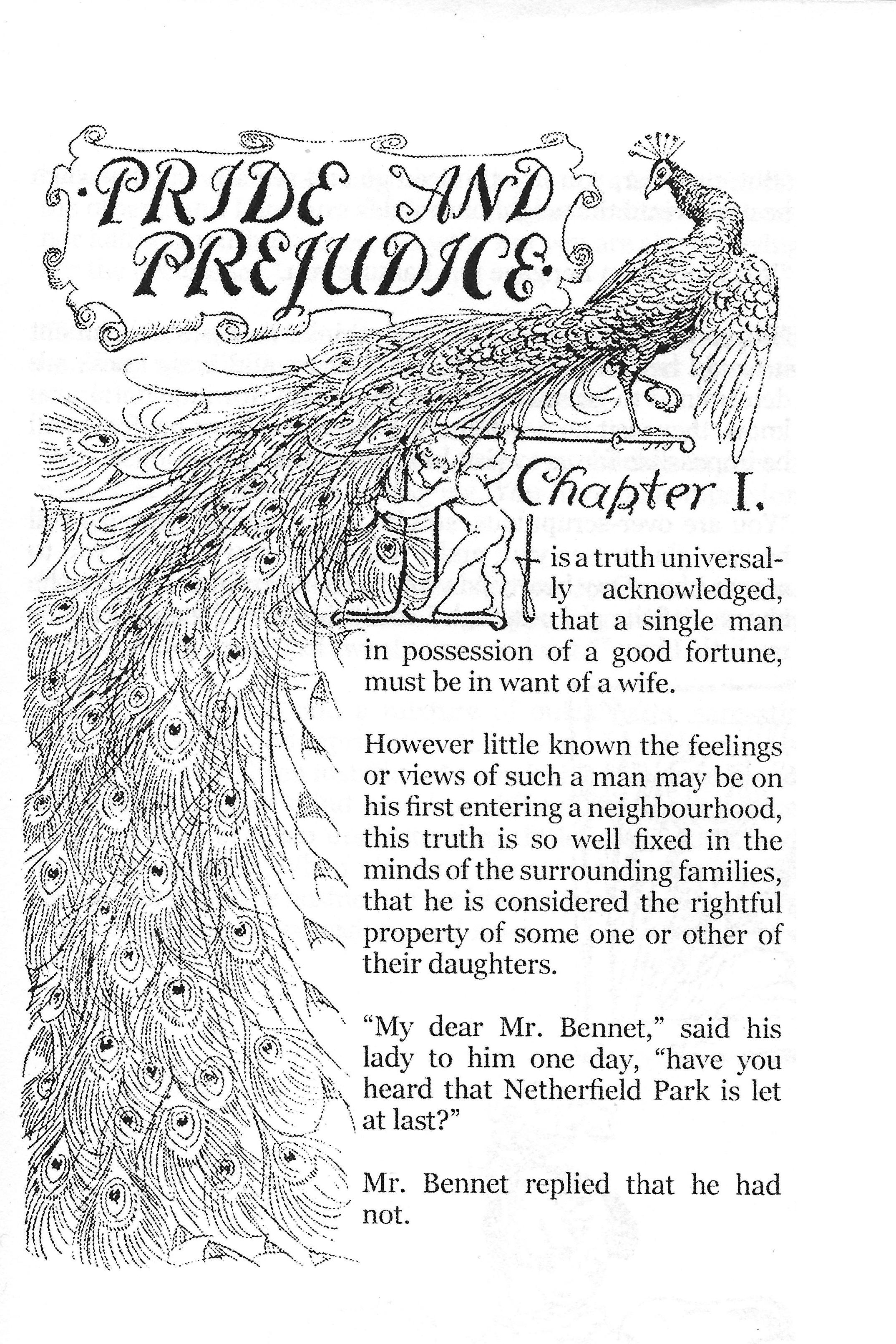 Incipit de l'édition de Pride and Prejudice de 1894, éditée par John Allen et illustrée par Hugh Thomson